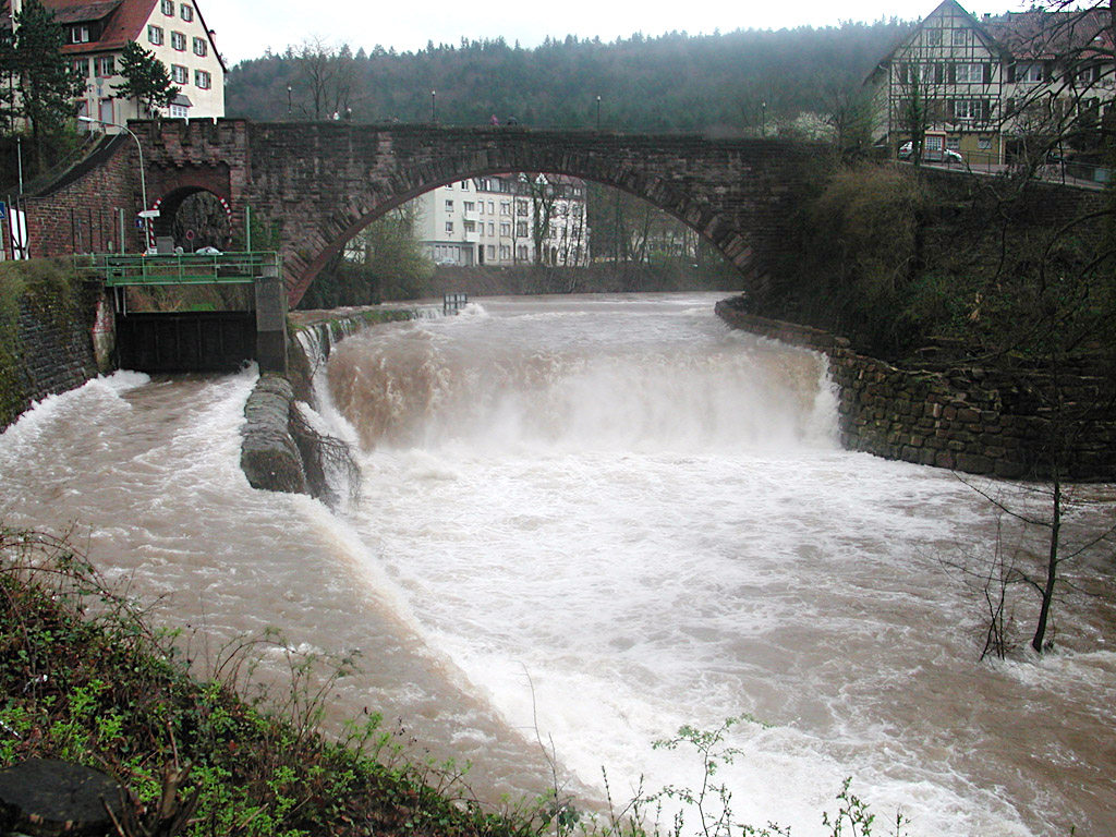 Die Nagold bei Pforzheim-Dillweißenstein. Foto: Jürgen Schoner (GNU-FDL)